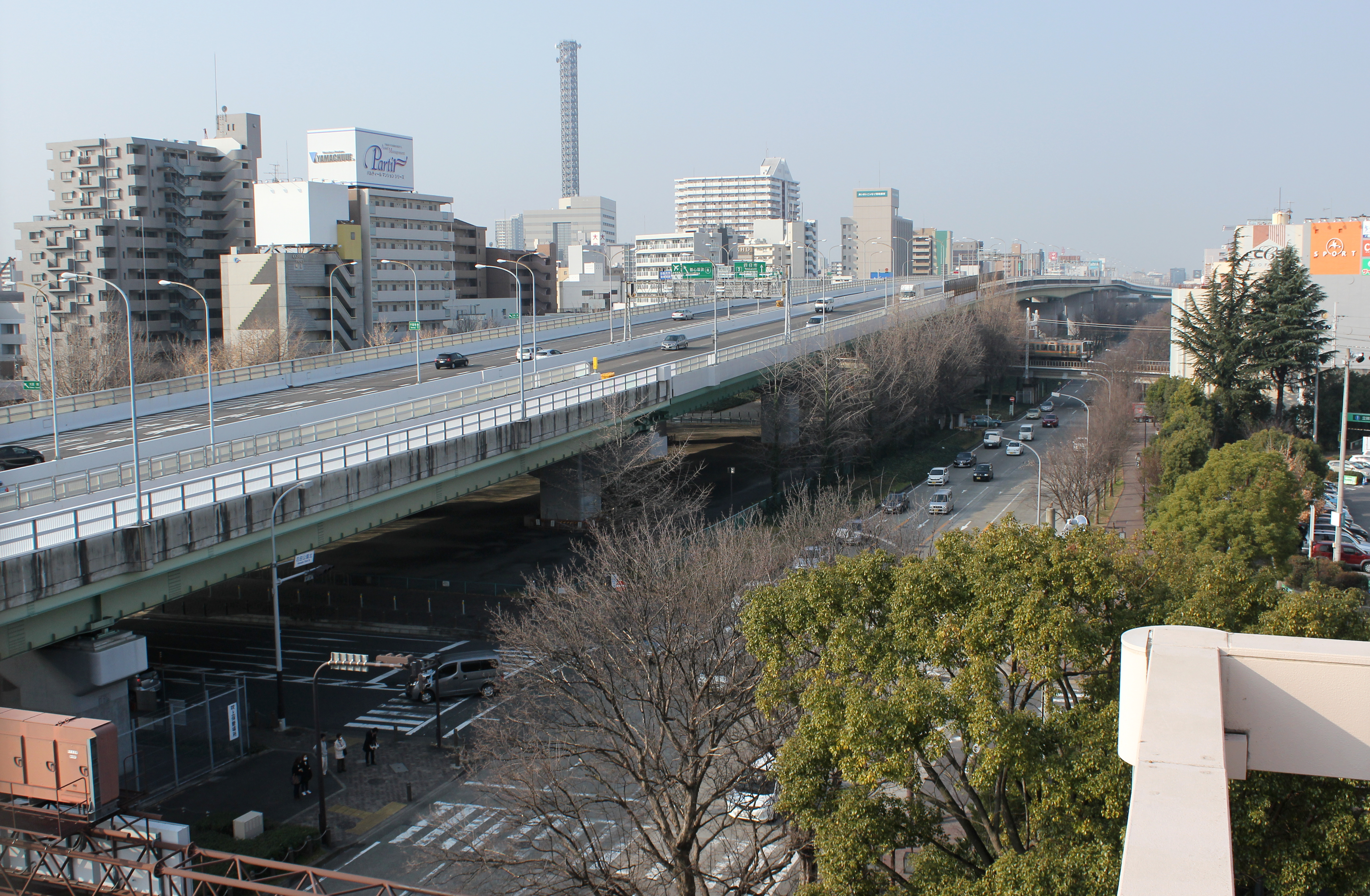 名古屋高速2号東山線 吹上付近（ショッピングセンター屋上から撮影）